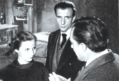 1948. Francesco Pasinetti, direttore del Centro Sperimntale di Cinematografia, assiste ad una lezione di recitazione di Vittorio De Sica